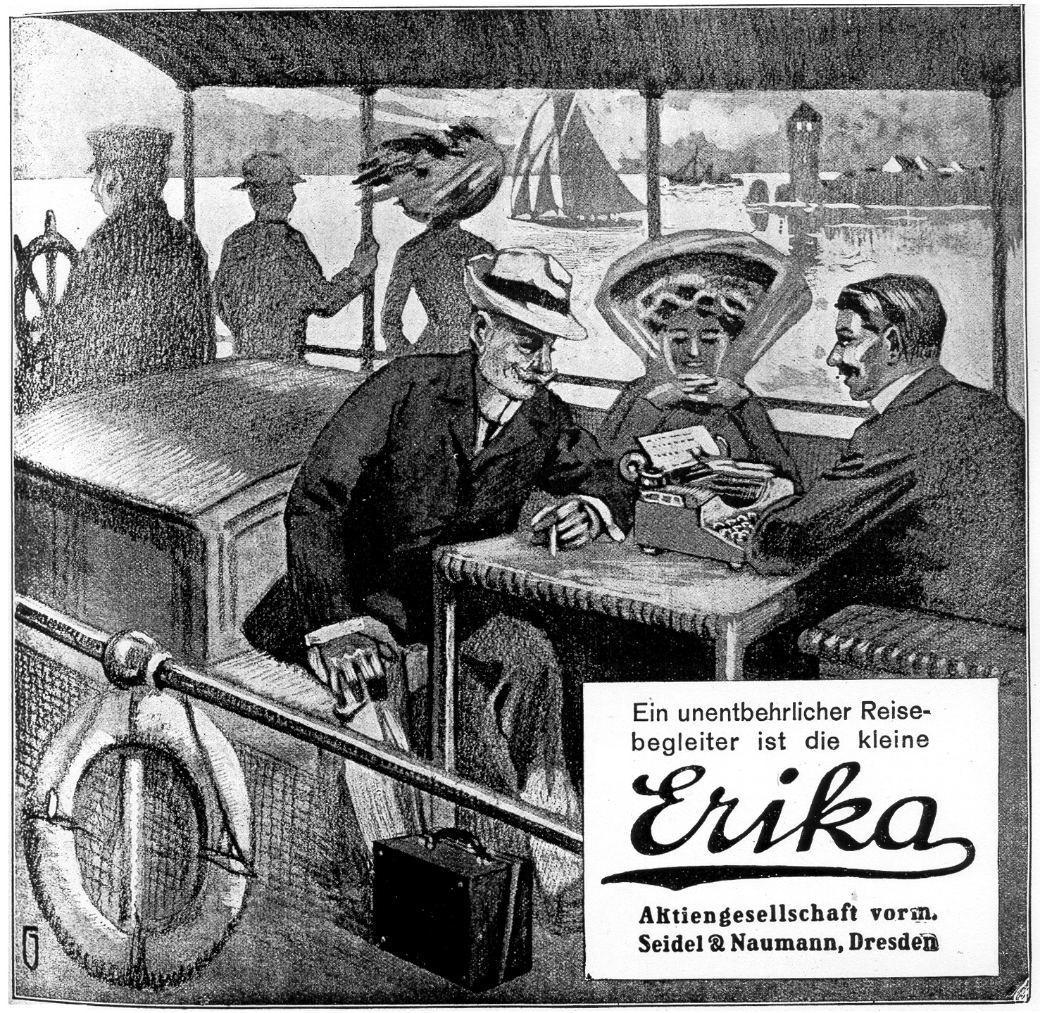 Anzeige für „Erika“-Reiseschreibmaschinen der AG vorm. Seidel & Naumann in Dresden